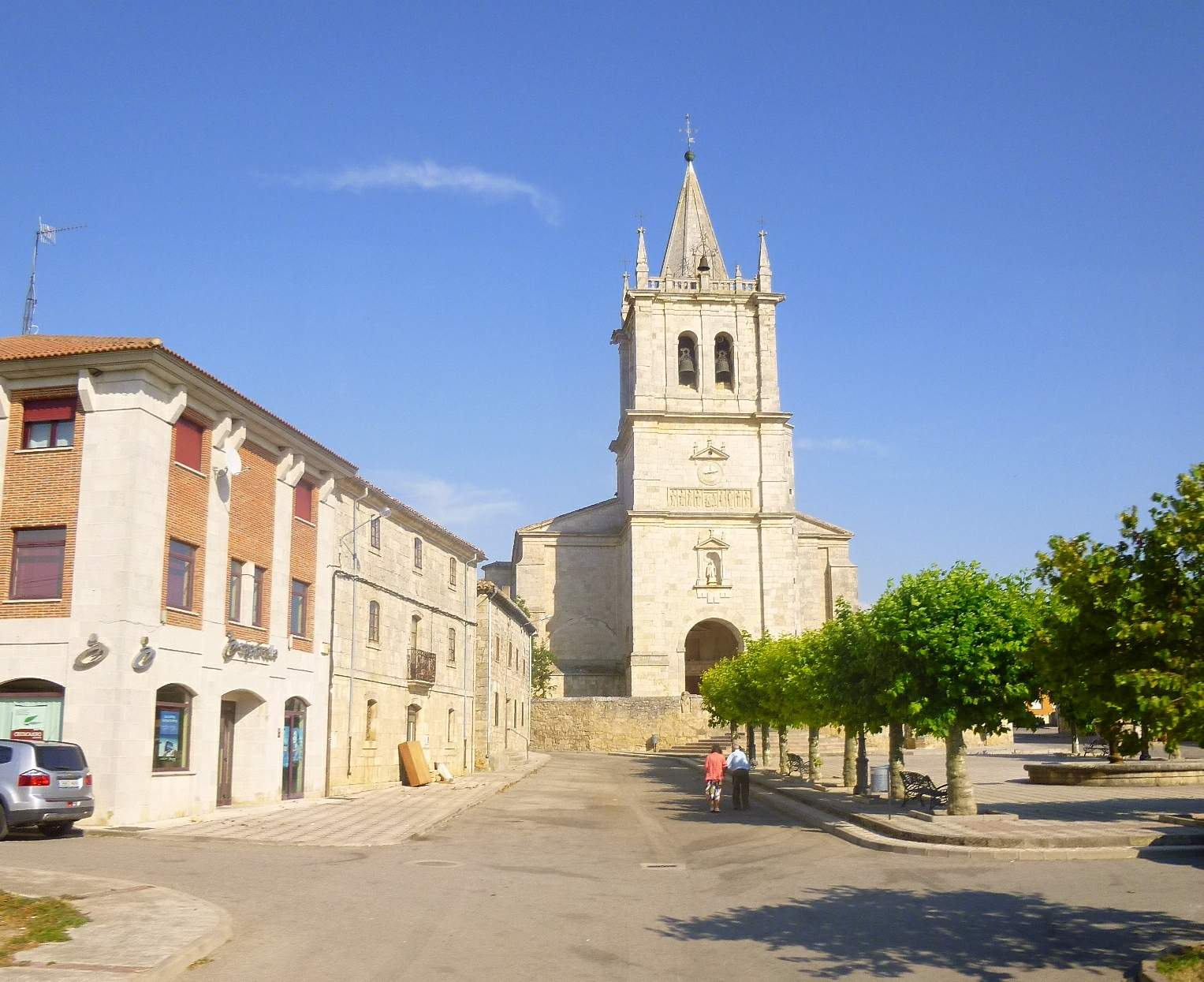 Santibáñez-Zarzaguda (Burgos)